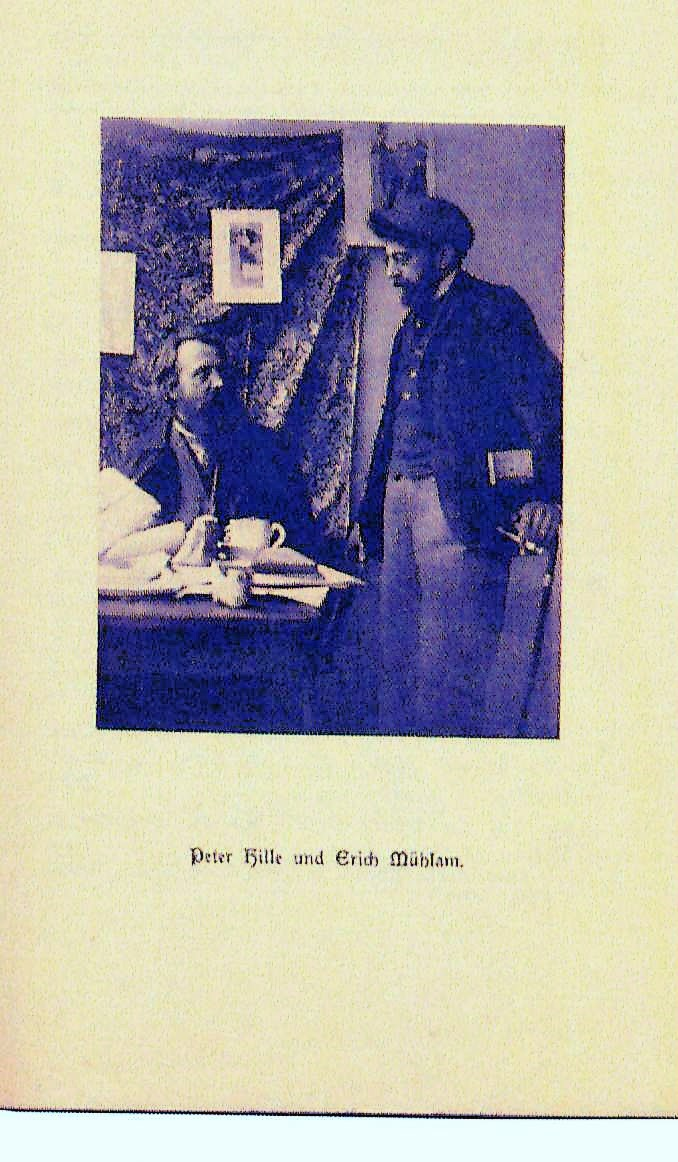 Peter Hille und Erich Mühsam. Bild in Horst Stobbe: Die moderne Literatur in Erstausgaben, seltenen Drucken, Handschriften und Bildnissen : 1880 - 1910 / eingel. von Franz Blei. München : Schönhuth, 1912. Hinweis: Peter Hille starb 1904.